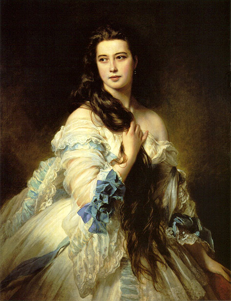 Barbe Dmitrievna Mergassov